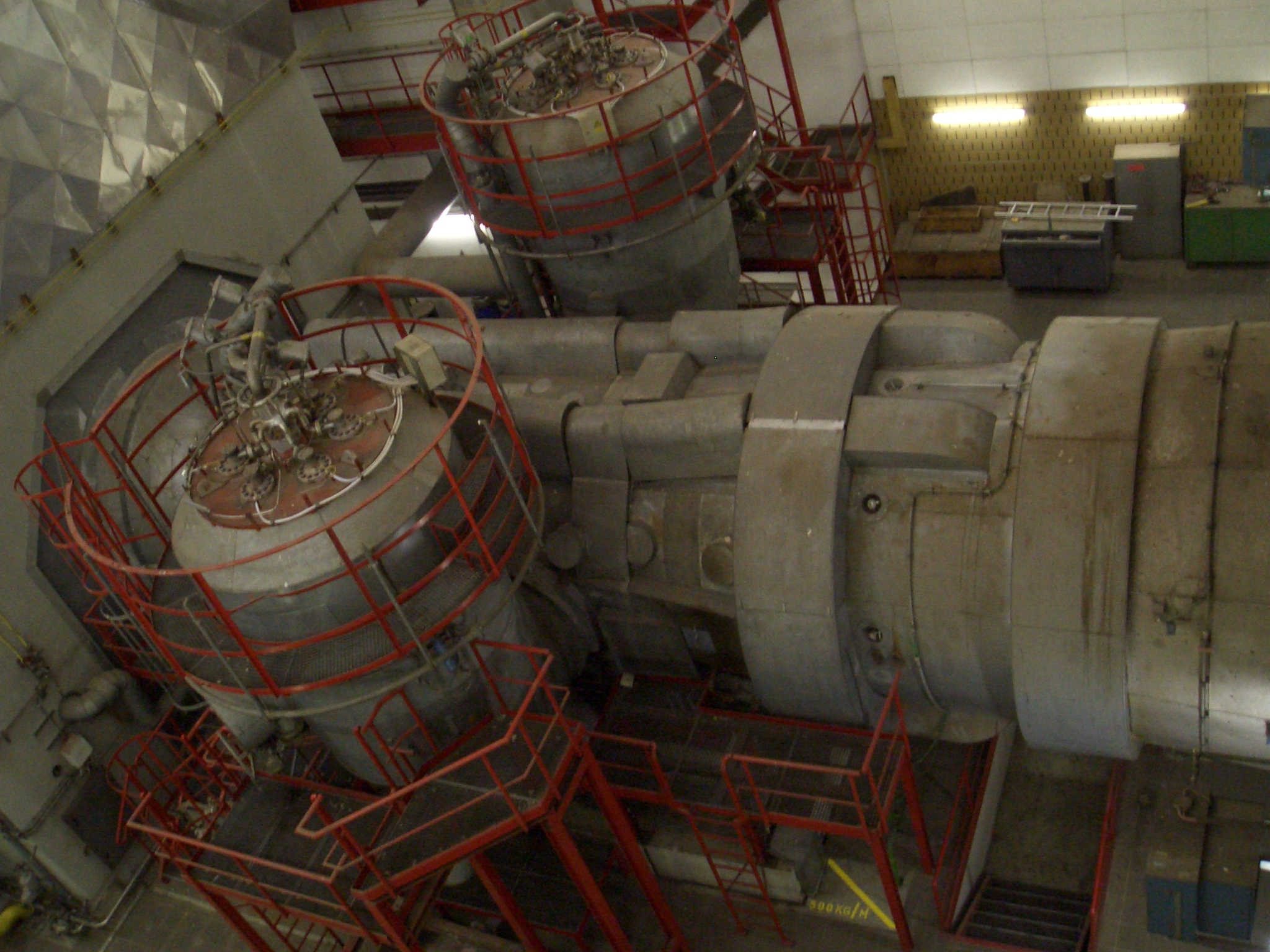 Kraftwerk Simmering, Block 3 (BKW3), Gasturbine (Heavy-Duty) von Siemens Typ V93.3 mit 82,3 MW